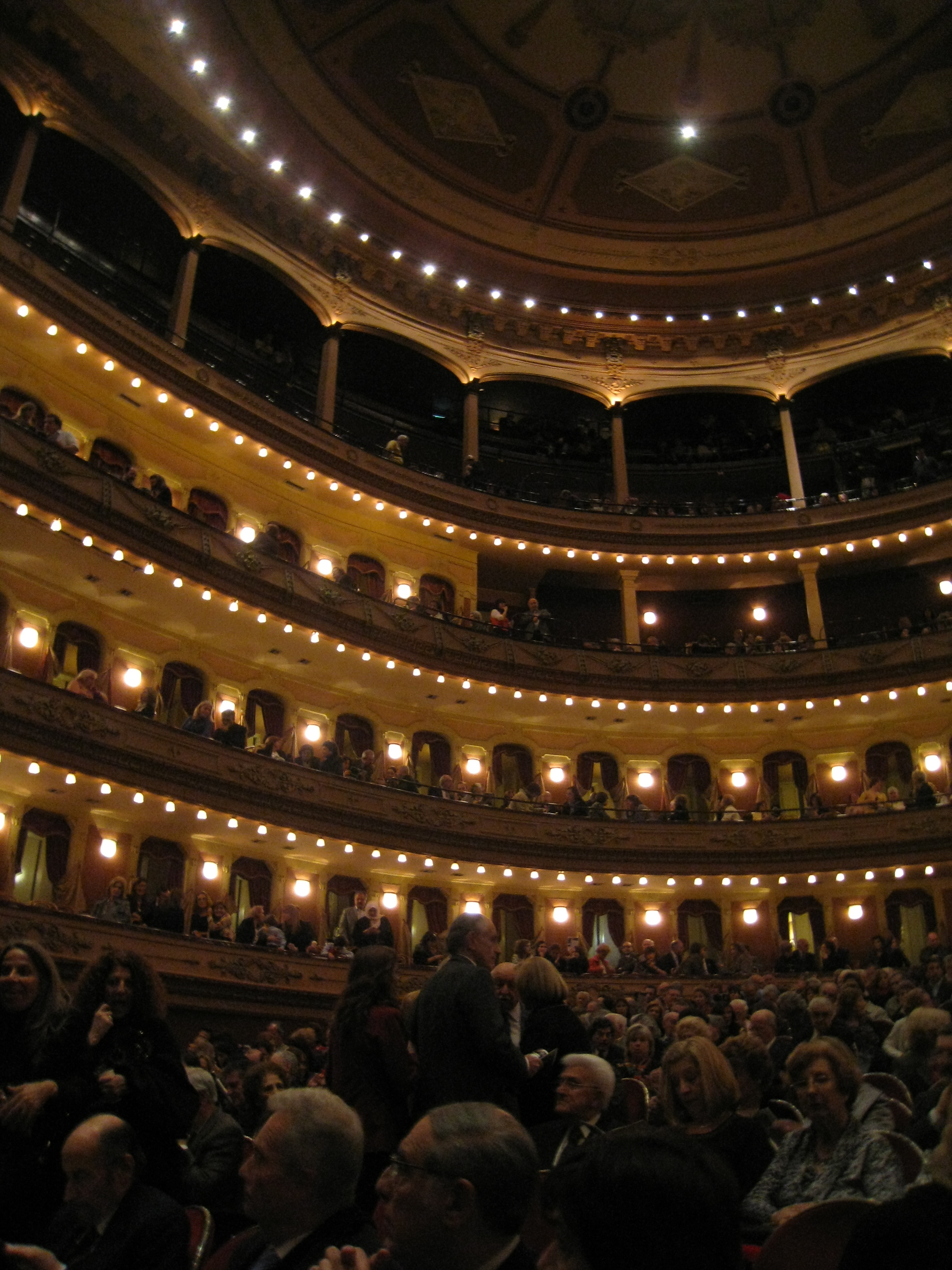 Main hall, Teatro Avenida, Buenos Aires.